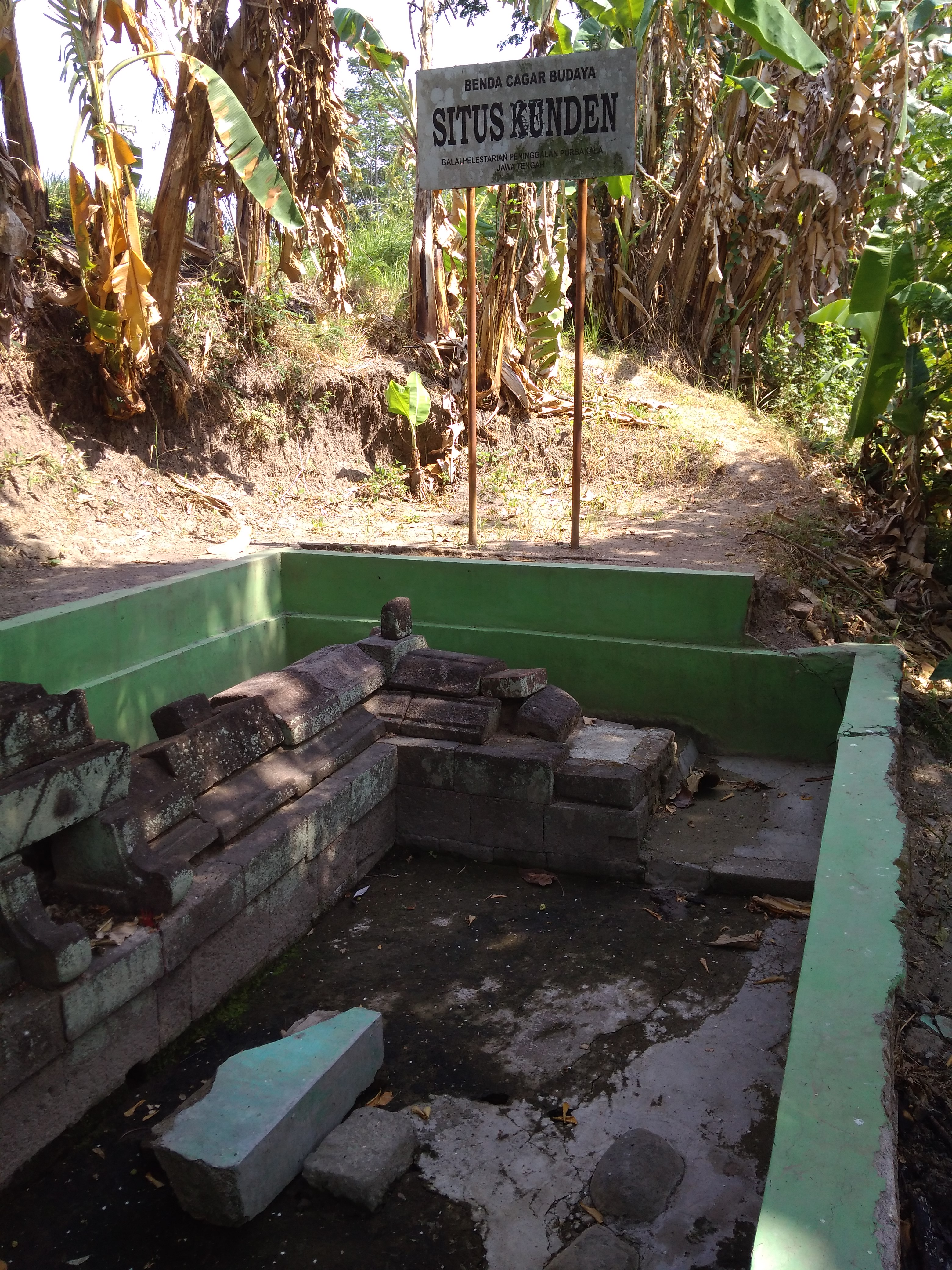 Situs Kunden di Kecamatan Klaten Selatan, Kabupaten Klaten